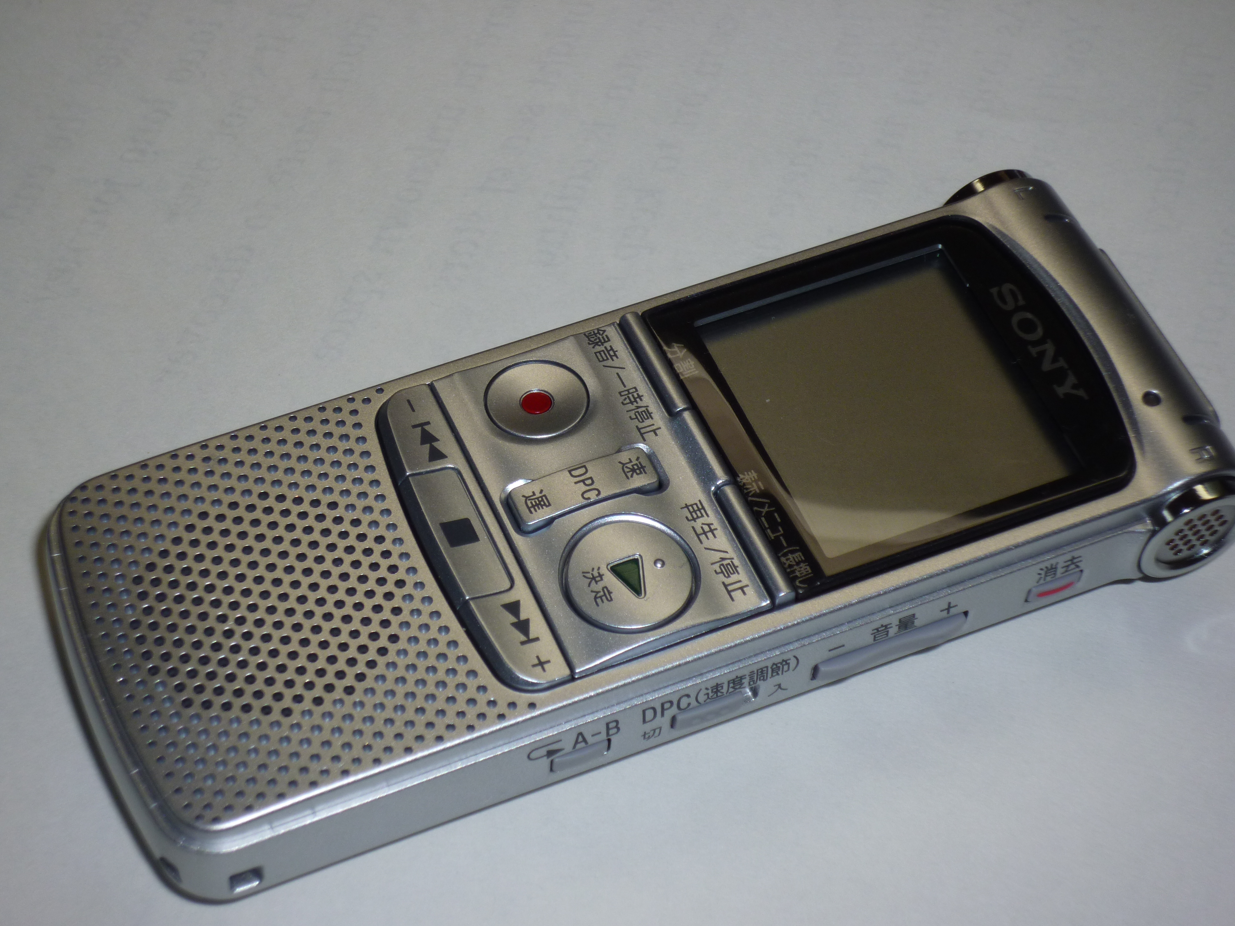 ICレコーダー SONY ICD-AX80